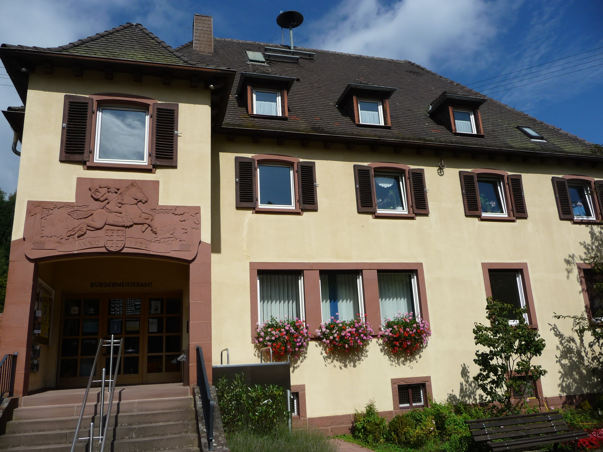 Elmstein ist eine Ortsgemeinde im Landkreis Bad Dürkheim in Rheinland-Pfalz.